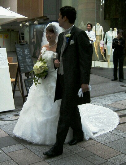 Weddingring